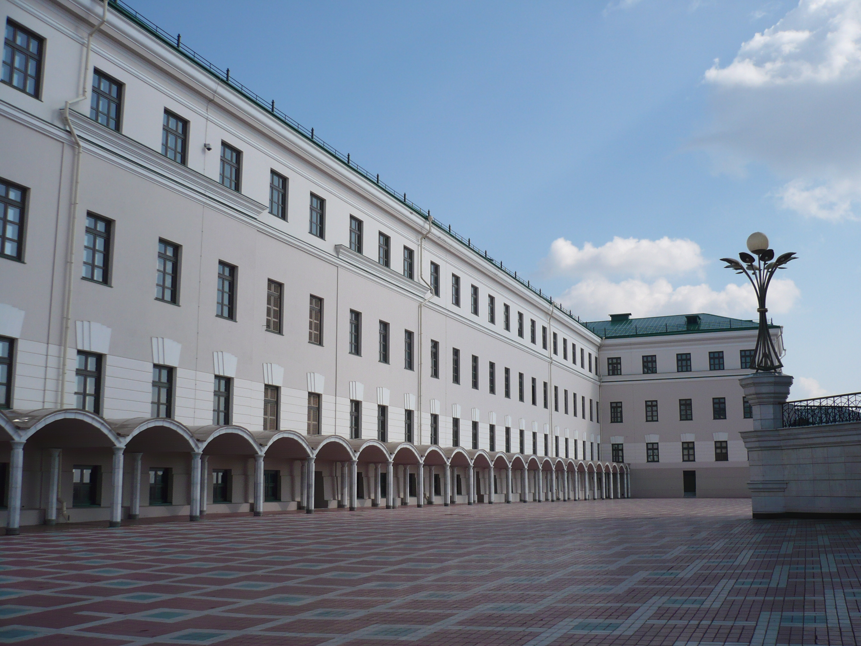 Ансамбль Казанского Кремля (Государственный историко-архитектурный и художественный музей-заповедник «Казанский Кремль») (Республика Татарстан, Казань, Кремль)